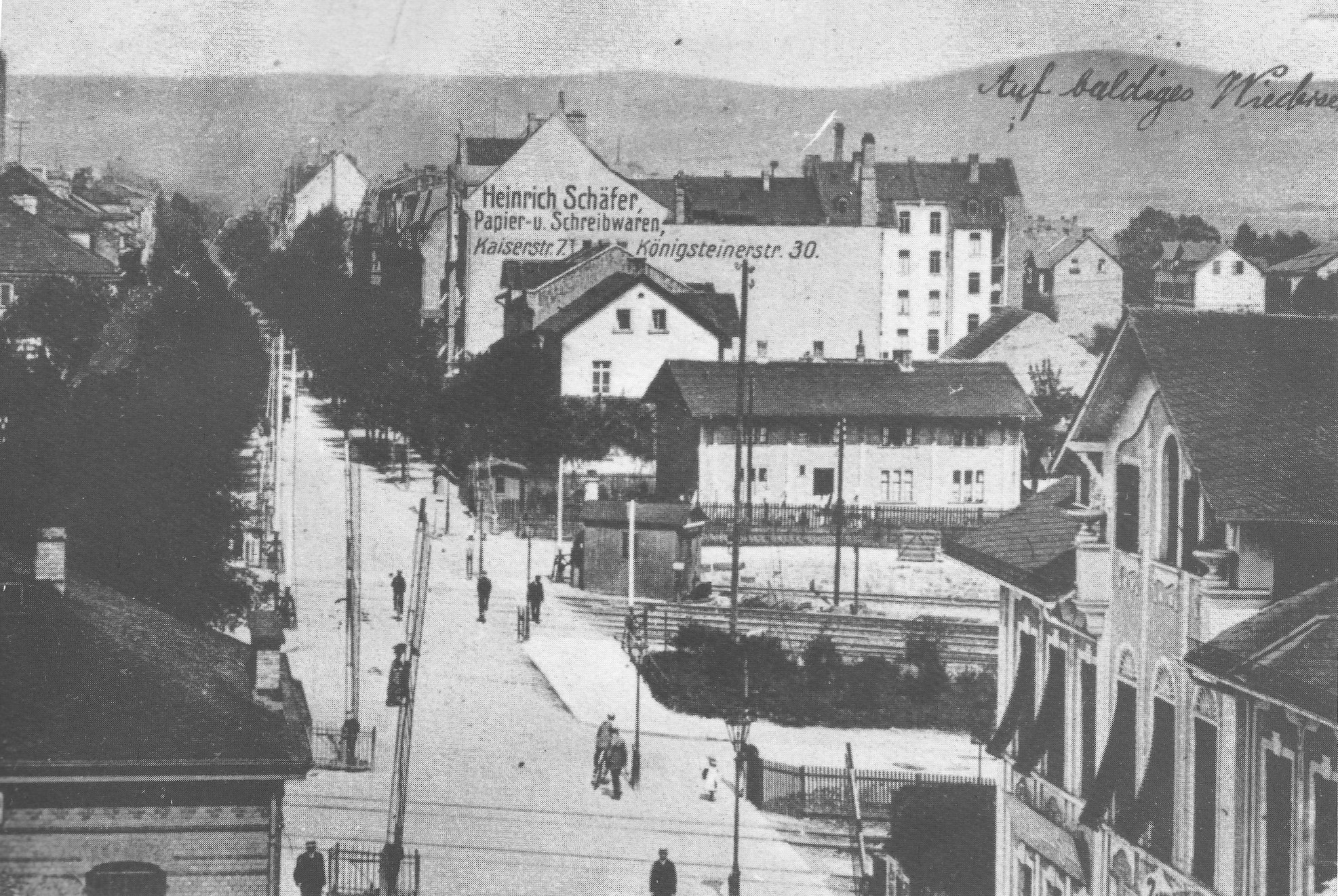 Postkarte „Königsteiner Straße und Dalbergplatz um 1900“